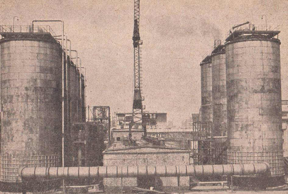 Wieże absorpcyjne do wytwarzania kwasu azotowego metodą bezciśnieniową w ZA Kędzierzyn (ca. 1960)